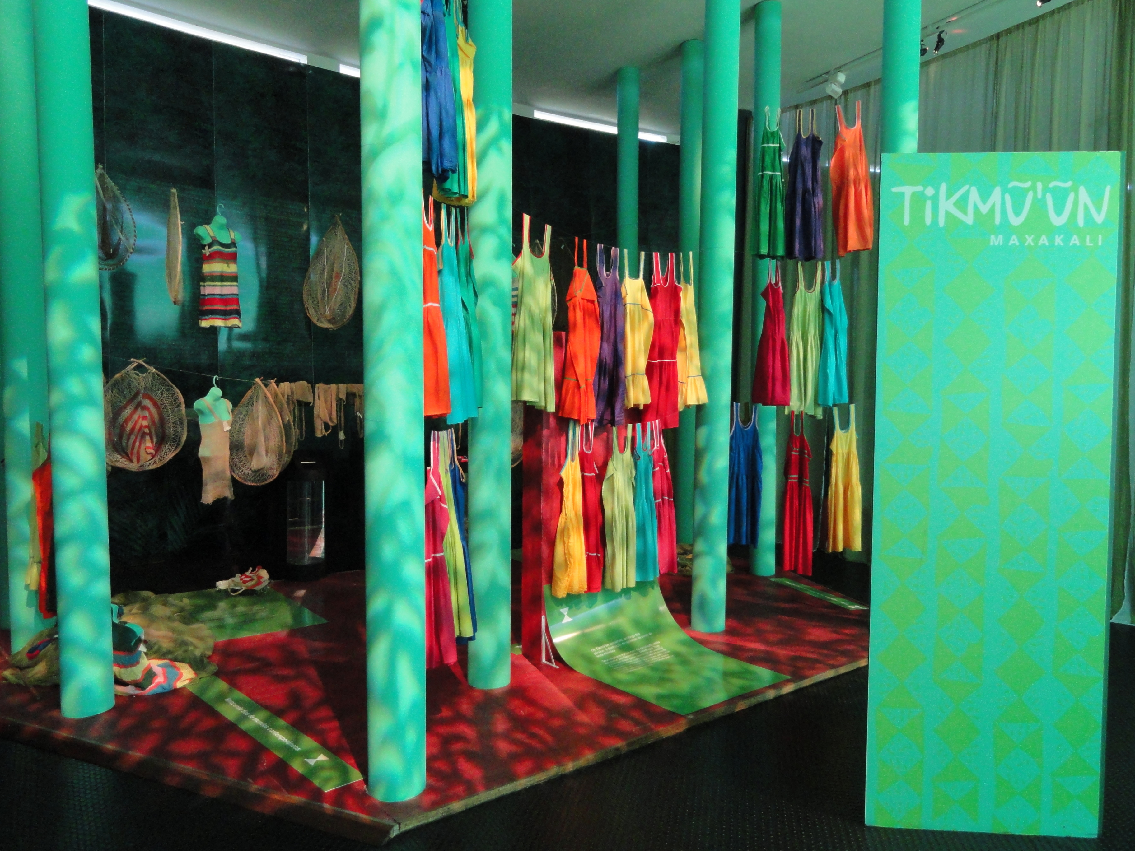 Exhibit in the Memorial dos Povos Indígenas, Brasília, Brazil.